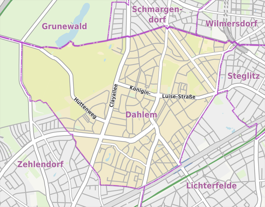 Übersichtskarte der Straßen und Ortslagen in Berlin-Dahlem